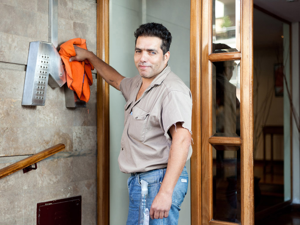 Foto: Estrella Herrera